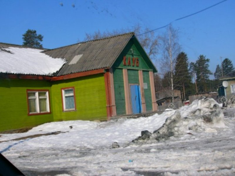 Посёлок Райконкоски